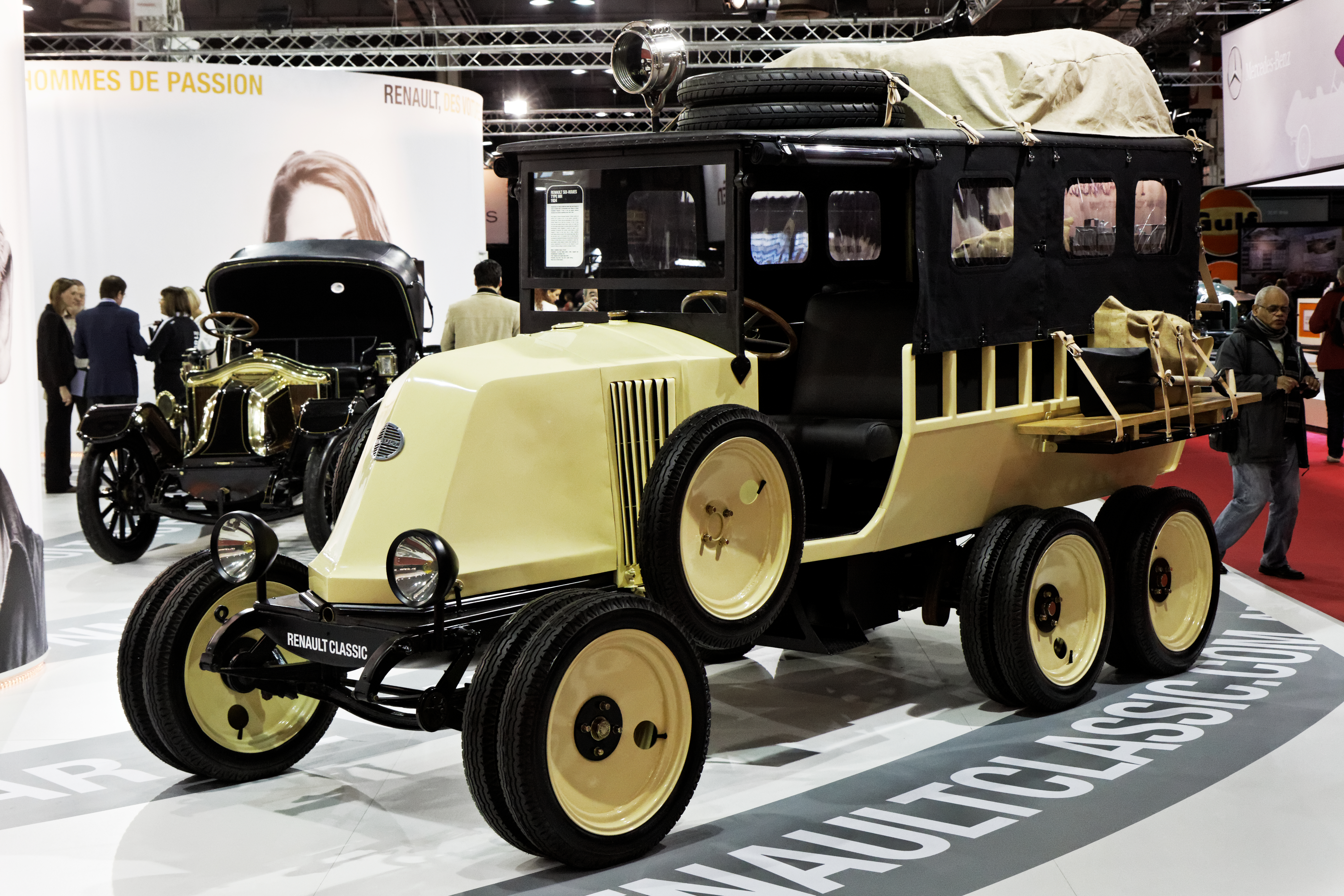 Une Renault six roues type MH présentée lors du salon Retromobile 2013.